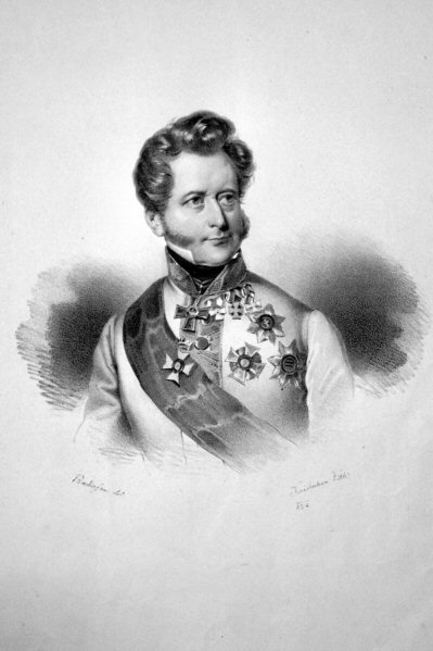 Theodor Graf Baillet de Latour (1780-1848), Feldzeugmeister, k. k. Kriegsminister. Lithographie von Josef Kriehuber, 1834